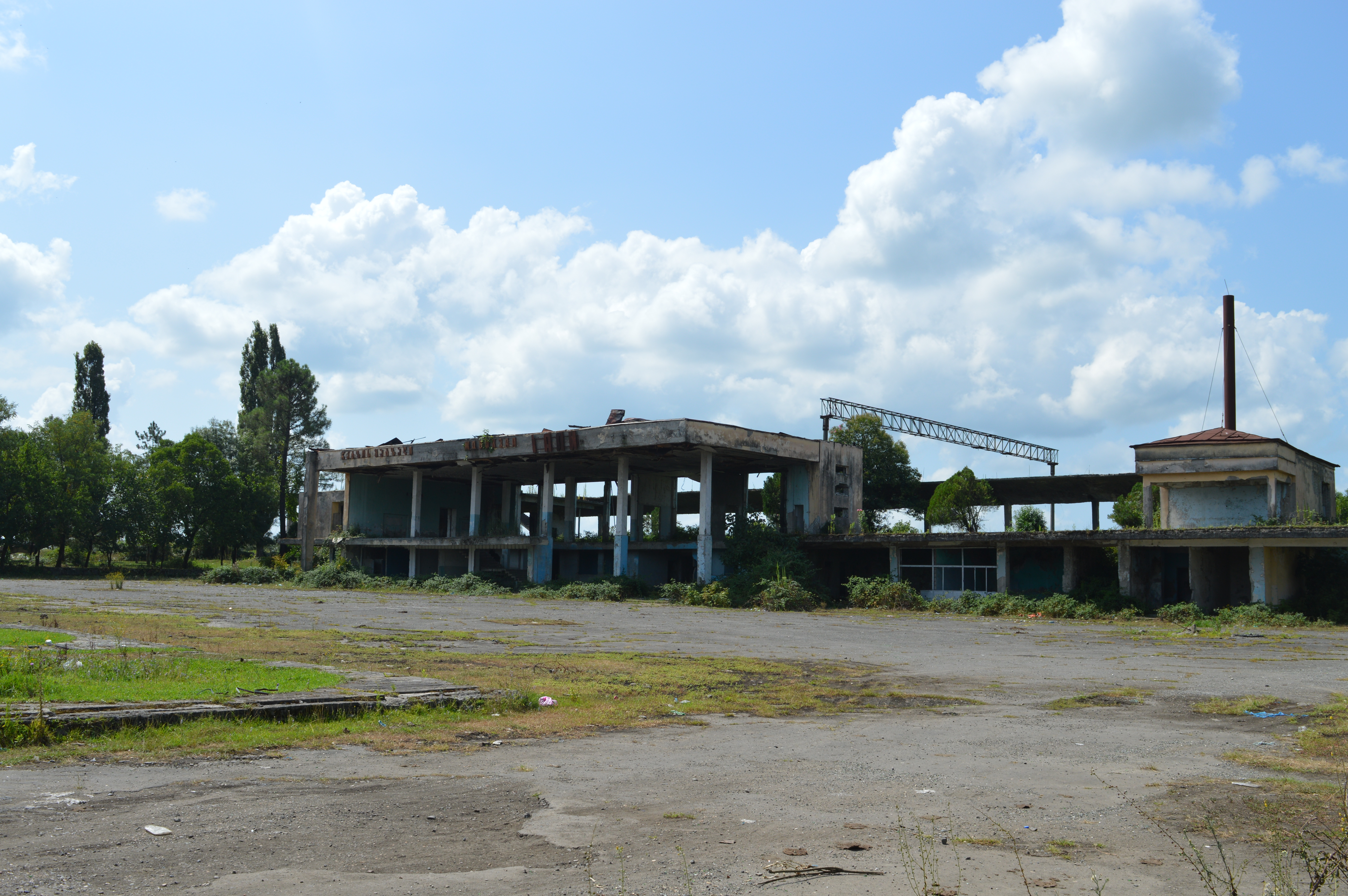 Железнодорожная станция Гал, 2016